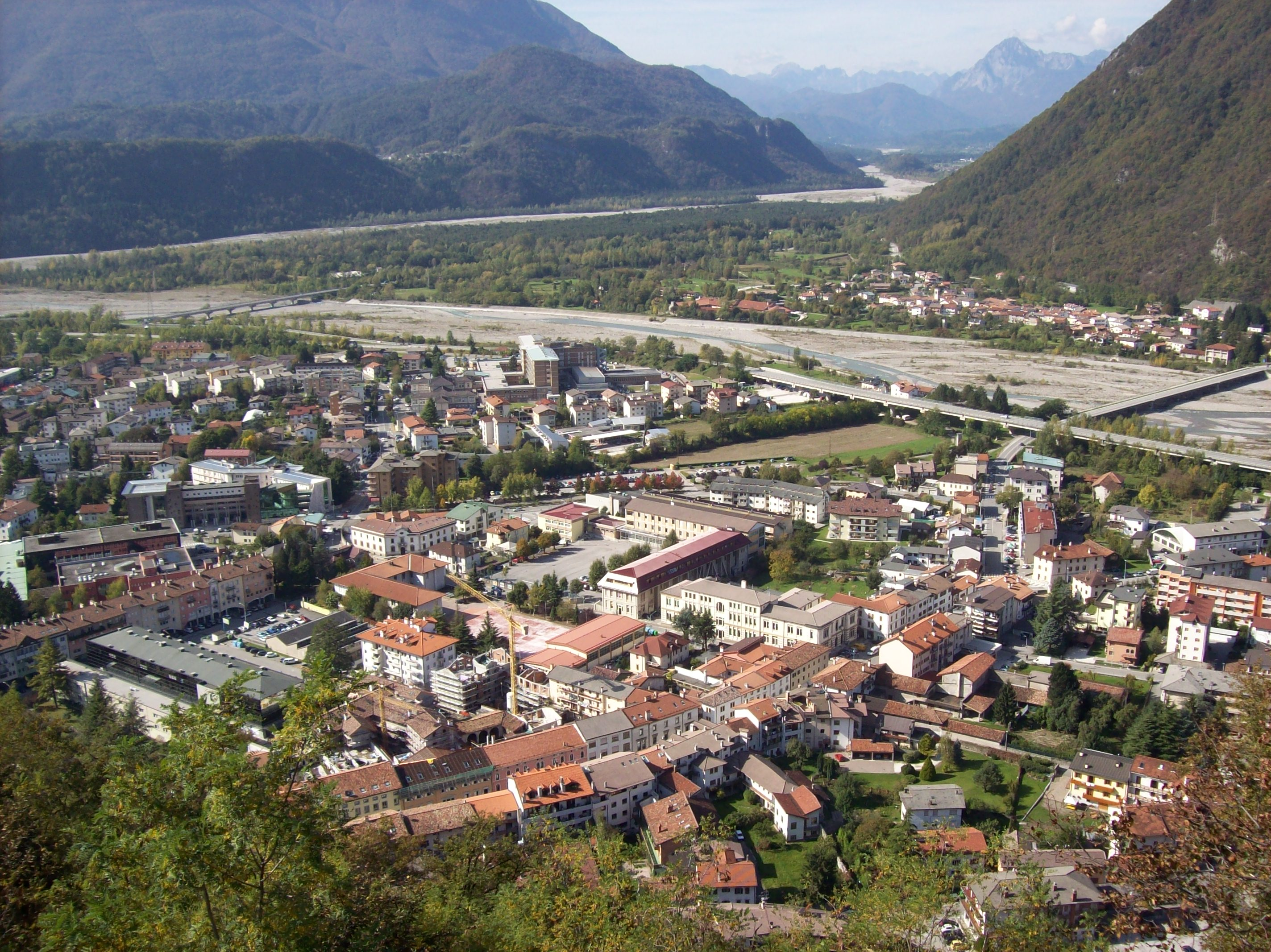 Tolmezzo (UD), panorama dalla Torre Picotta